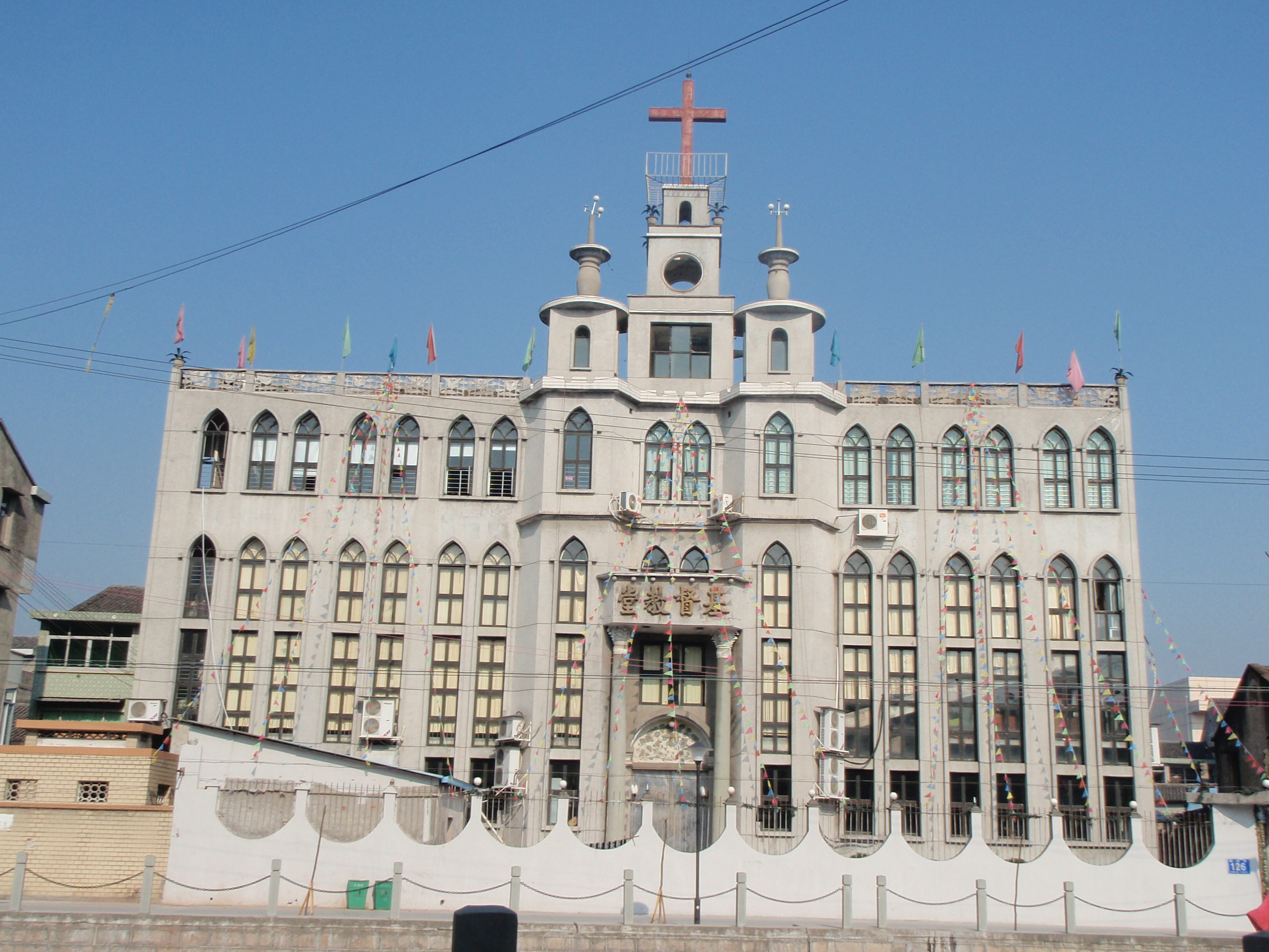 瞿溪基督教堂